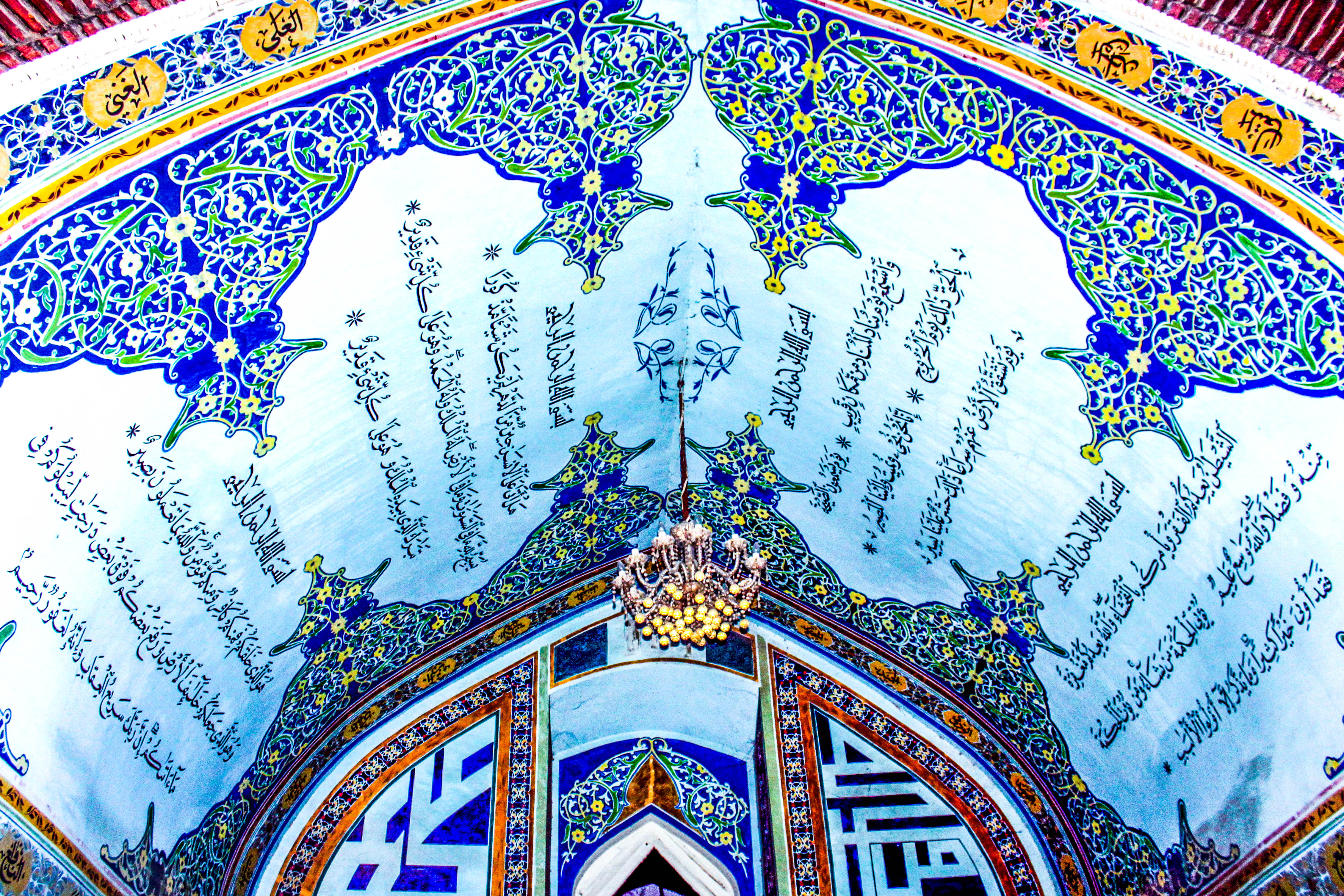 Qazaxlar məscidinin əsas girişində portal